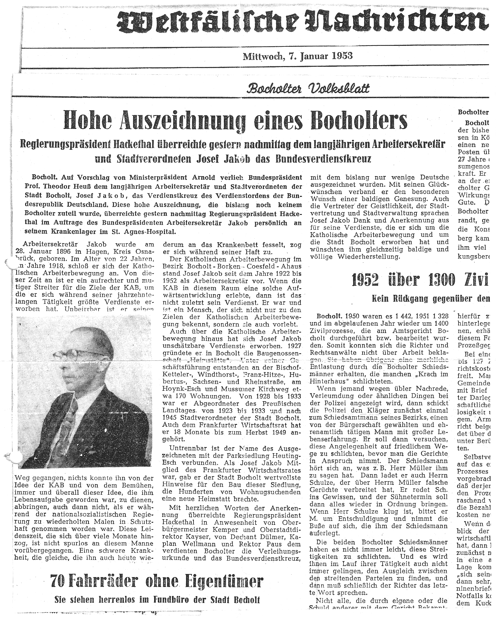 Familienarchiv Wilhelm Jakob, Sohn von Josef Jakob